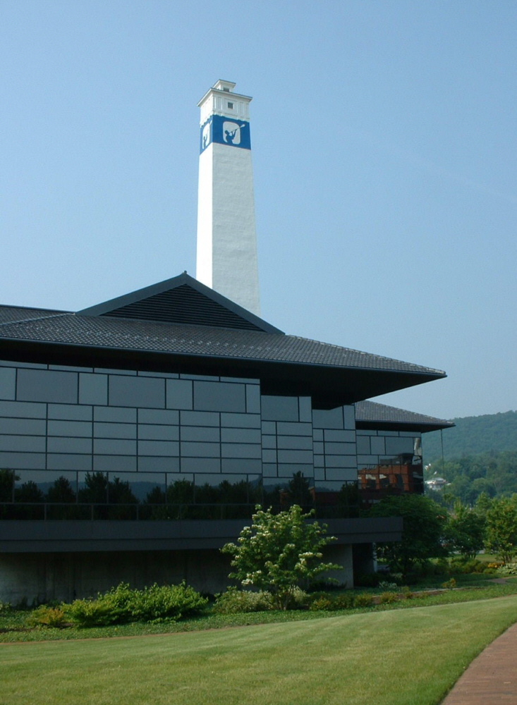 Corning, NY: Neubau des Hauptquartiers der Firma Corning Inc., dahinter "Little Joe" (ehemalige Fertigungseinrichtung für Thermometerglasröhren)